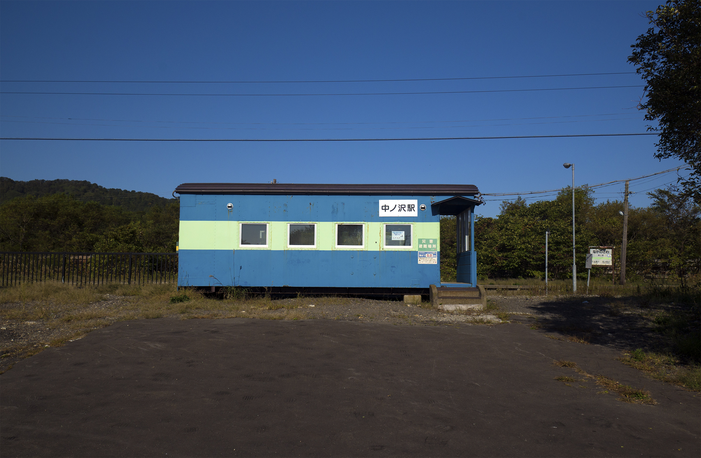 北海道旅客鉄道函館本線中ノ沢駅駅舎全景